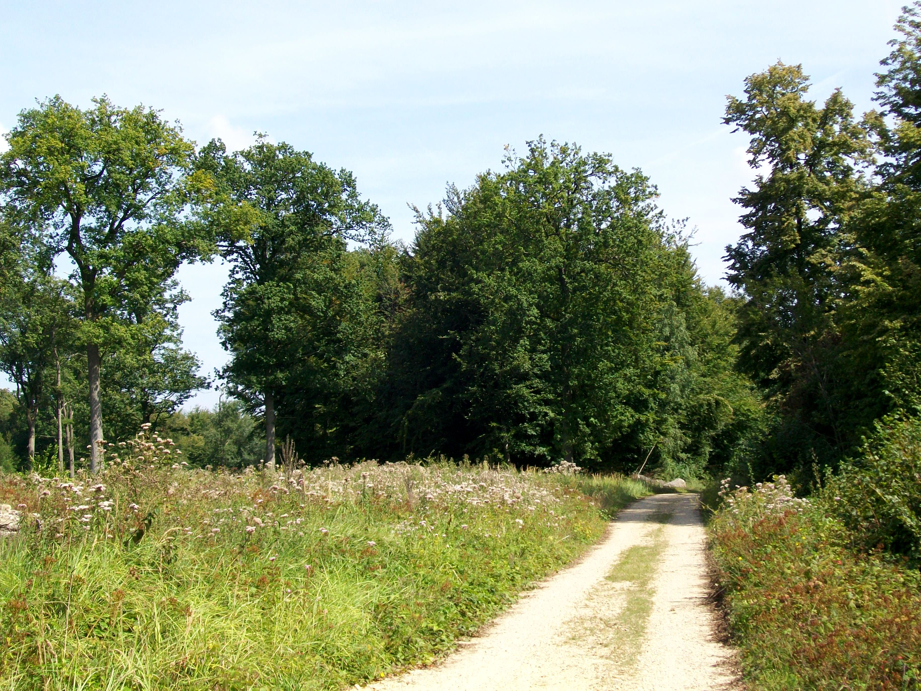 La route des Fossés dans la forêt d'Halatte, qui délimite au sud le plateau du mont Alta.